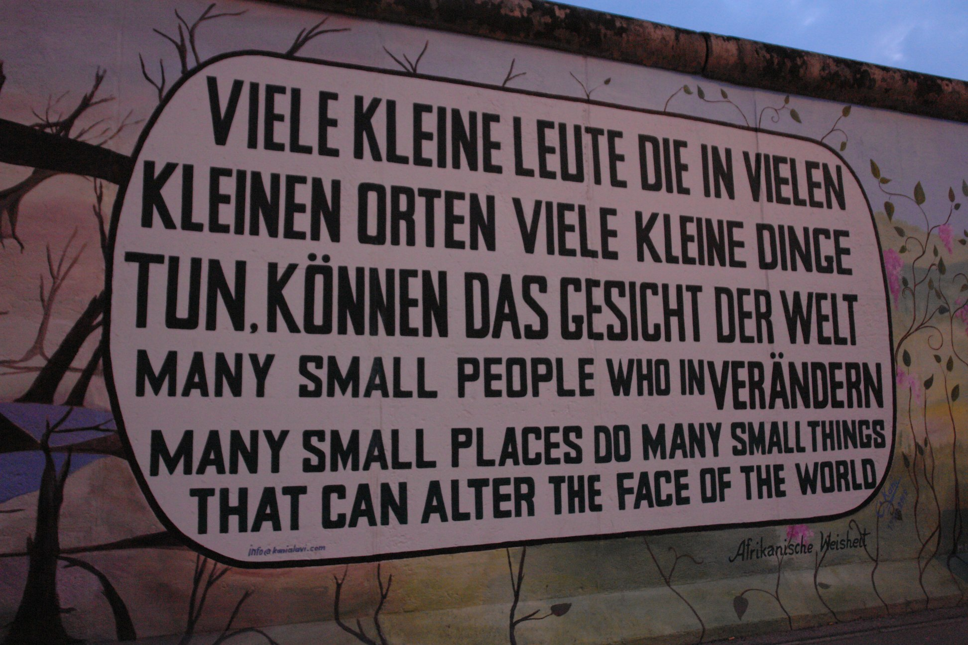 Schriftzug an der ehemaligen Berliner Mauer: Vielen kleine Leute die in vielen kleinen Orten viele kleine Dinge tun, können das Gesicht der Welt verändern Many small people who in many small places do many small things that can alter the face of the world. Afrikanische Weisheit